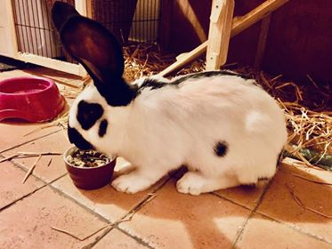 Lapin géant papillon, une espèce courante de lapin domestique